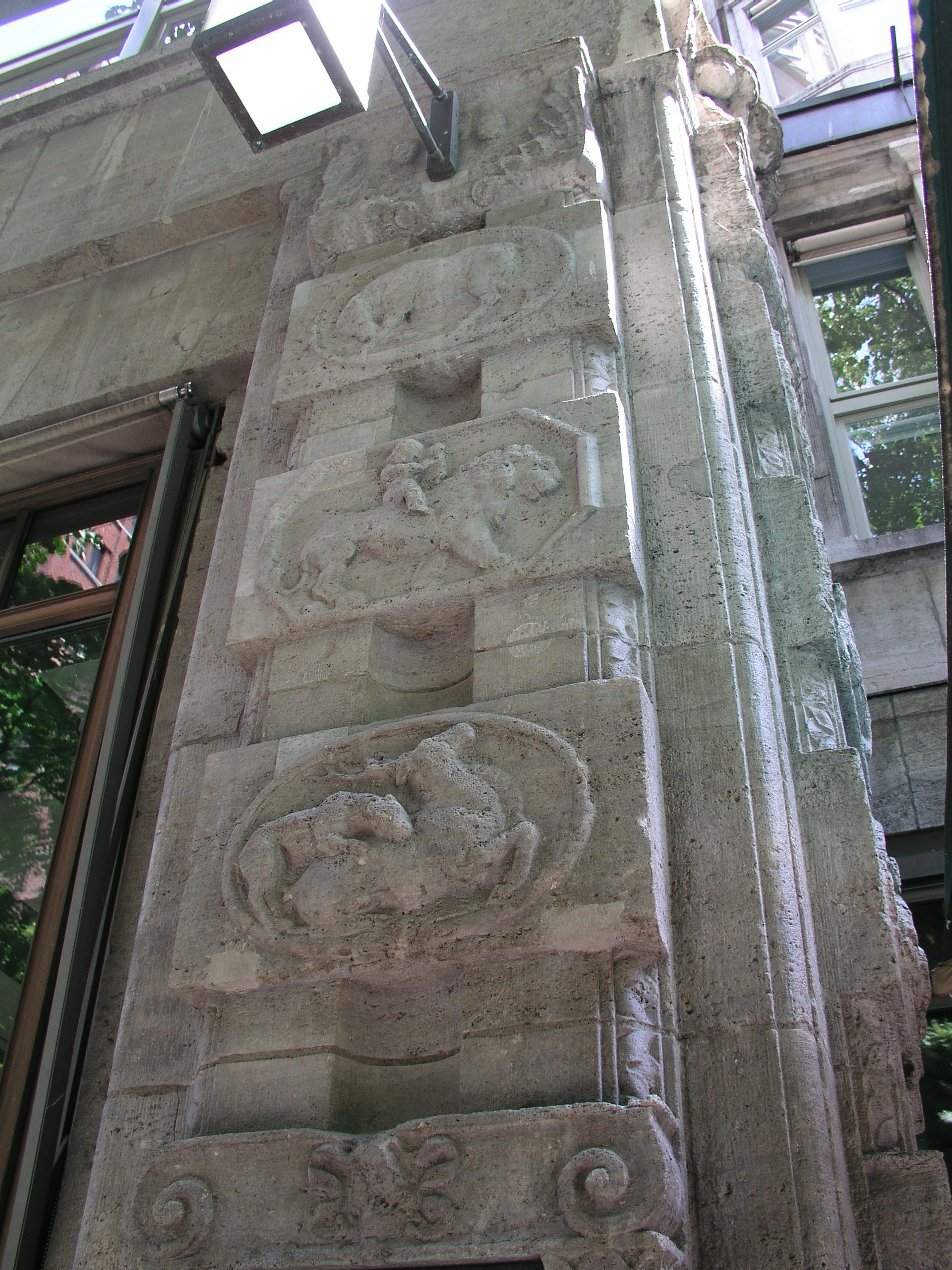 Haus Huth - Eingangsbereich mit Tierdarstellung